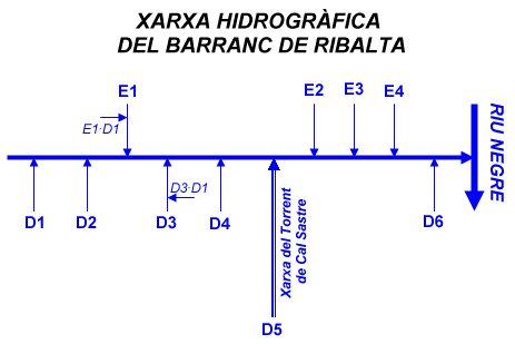 Esquema de la xarxa hidrogràfica del Barranc de Ribalta, tributari del Riu Negre, al Solsonès